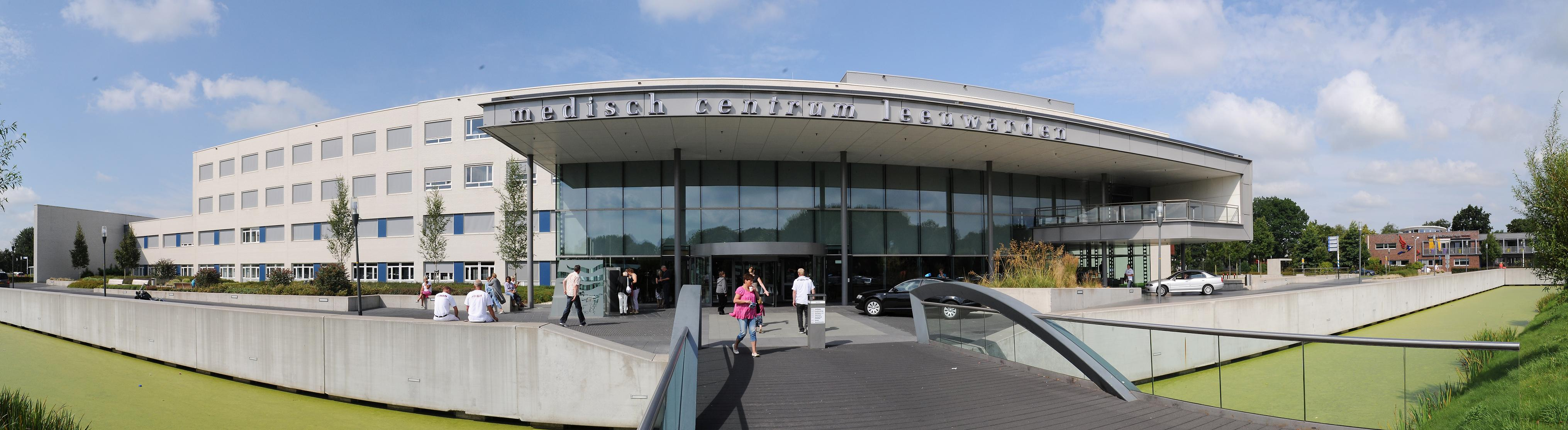 MCL panorama eksterieur.